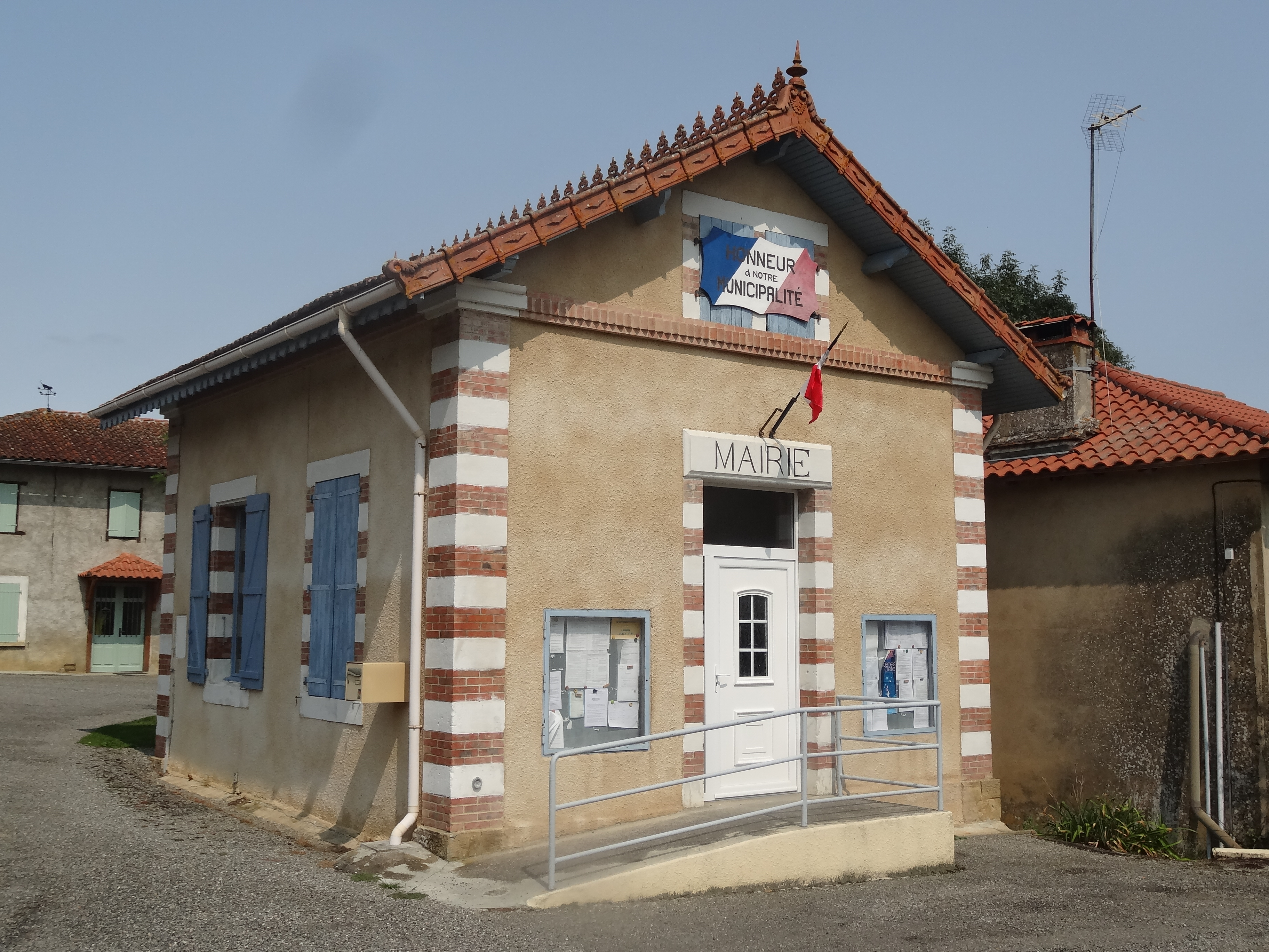 Mairie de Sère.